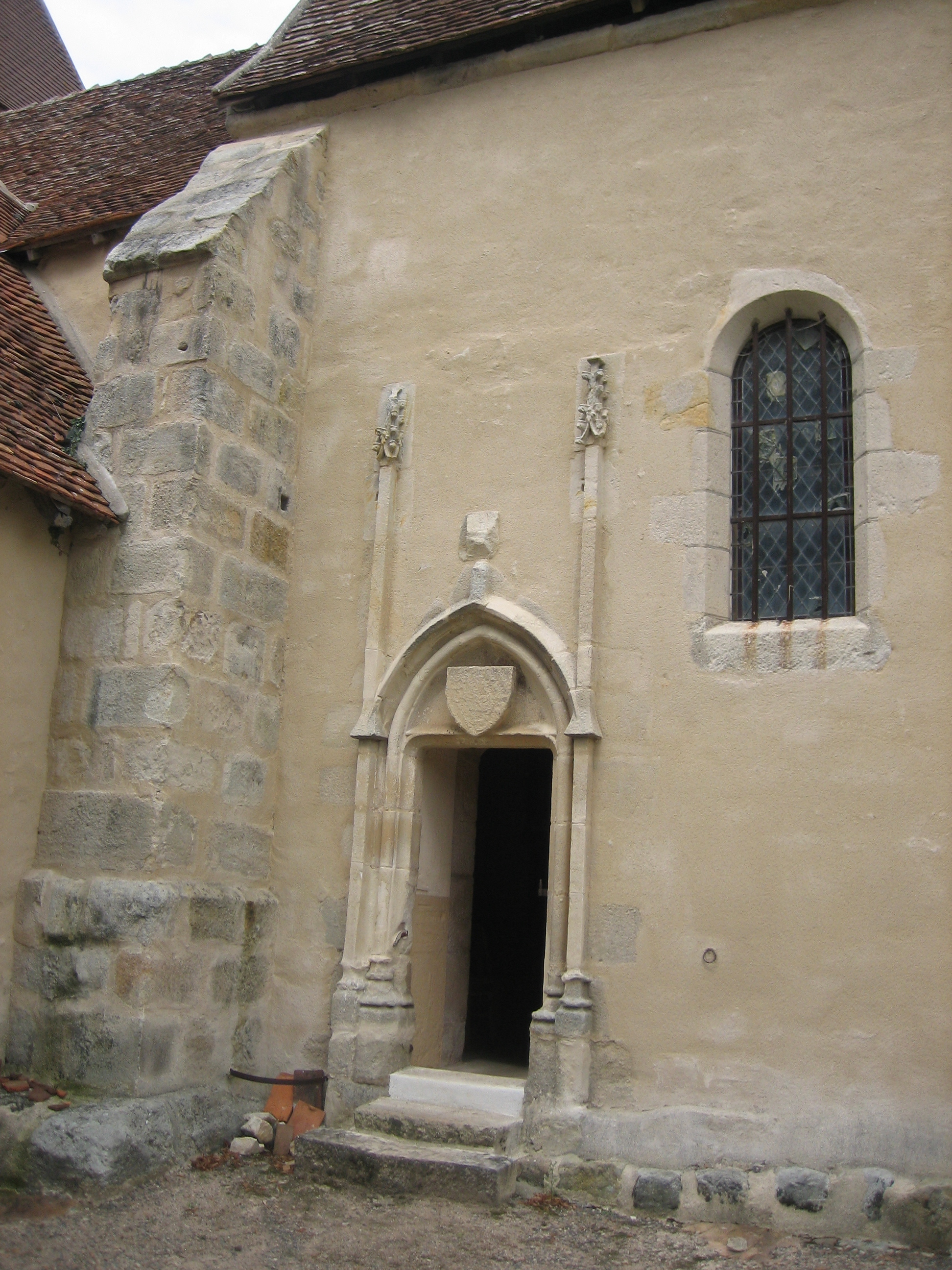 Entrée latérale de l'église Saint-Maur à Saint-Maur (Cher)